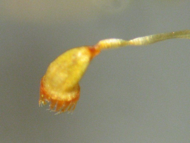 Torf-Krummstielmoos (Campylopus pyriformis), Horster Moor, Kapsel, etwa 32x vergrößert